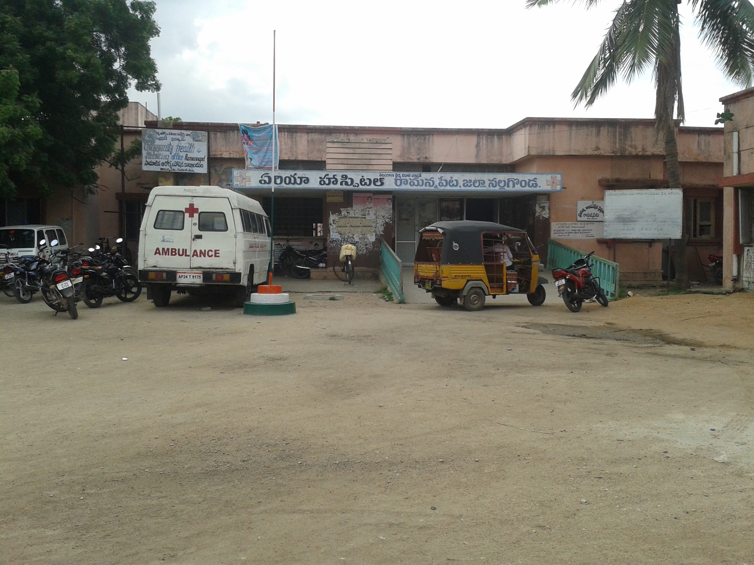 రామన్నపేట ఏరియా వైధ్యశాల